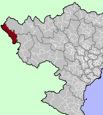 Muong Nhe District, Dien Bien Province, Vietnam.